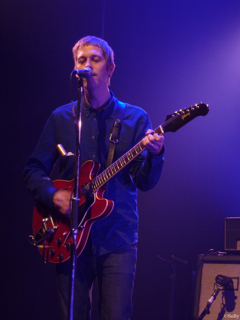 Beady Eye @ Ancienne Belgique